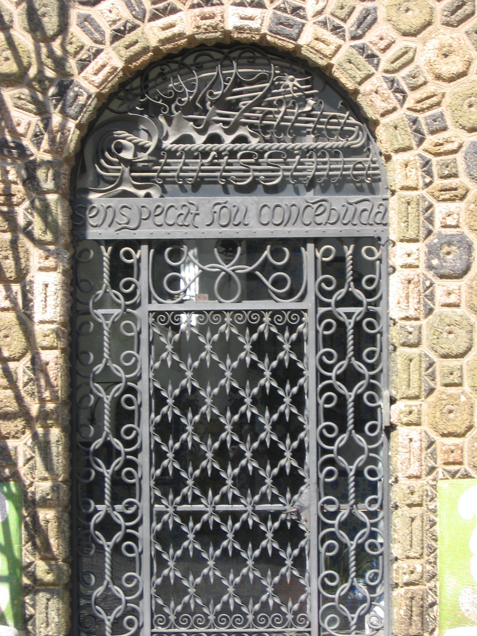 Puerta de entrada de la Torre Bellesguard, de Antoni Gaudí (Barcelona)